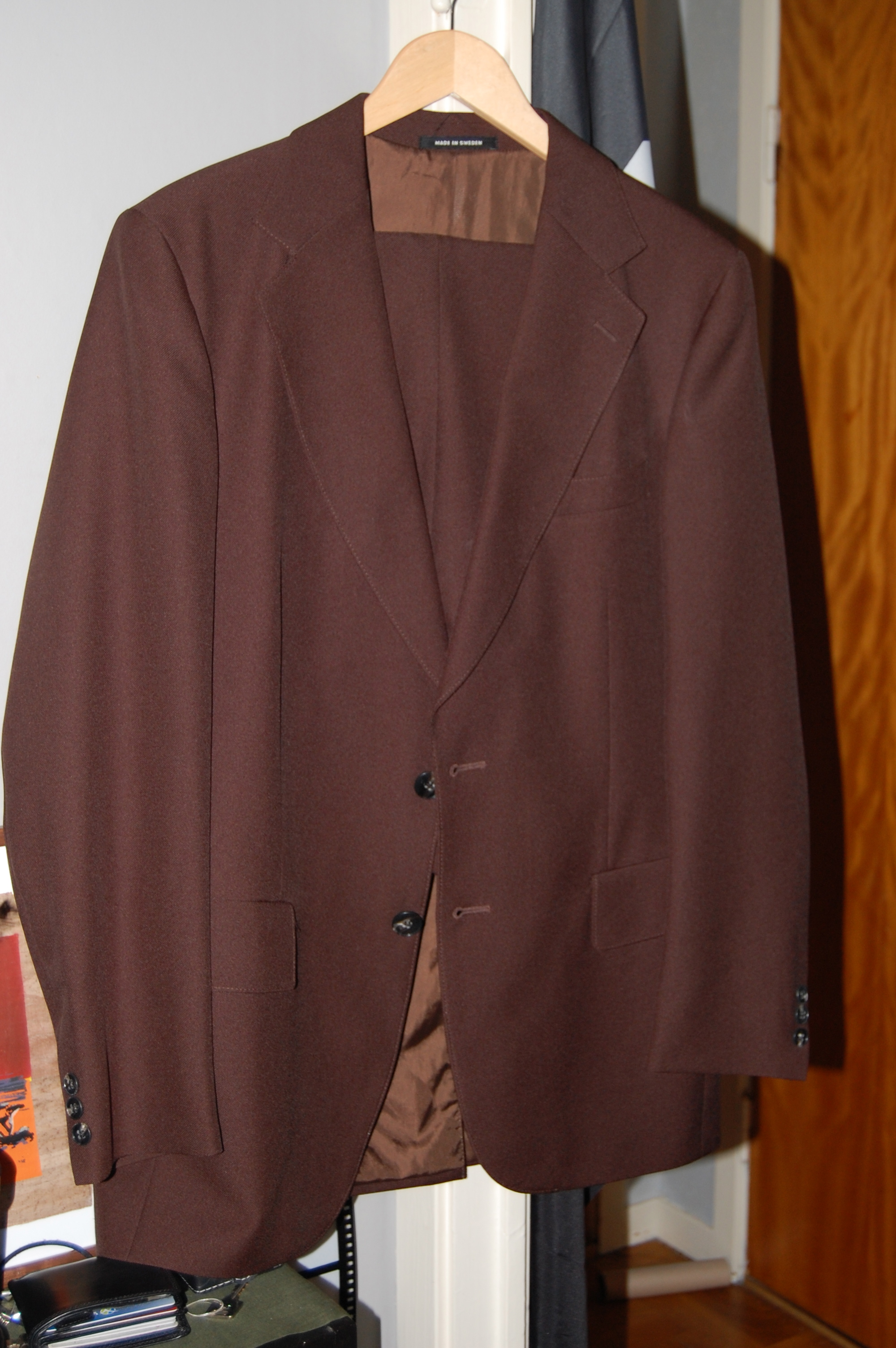 En brun kostym från Tiger of Sweden i serien "Tiger 2000"